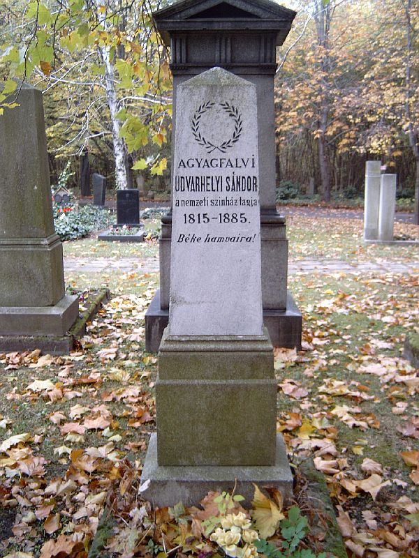 Udvarhelyi Sándor (1815 – Budapest, 1885. november 14.) (Udvarhelyi Miklós öccse) énekes (basszus), színész sírja Budapesten. Kerepesi temető: 34/1-2-27